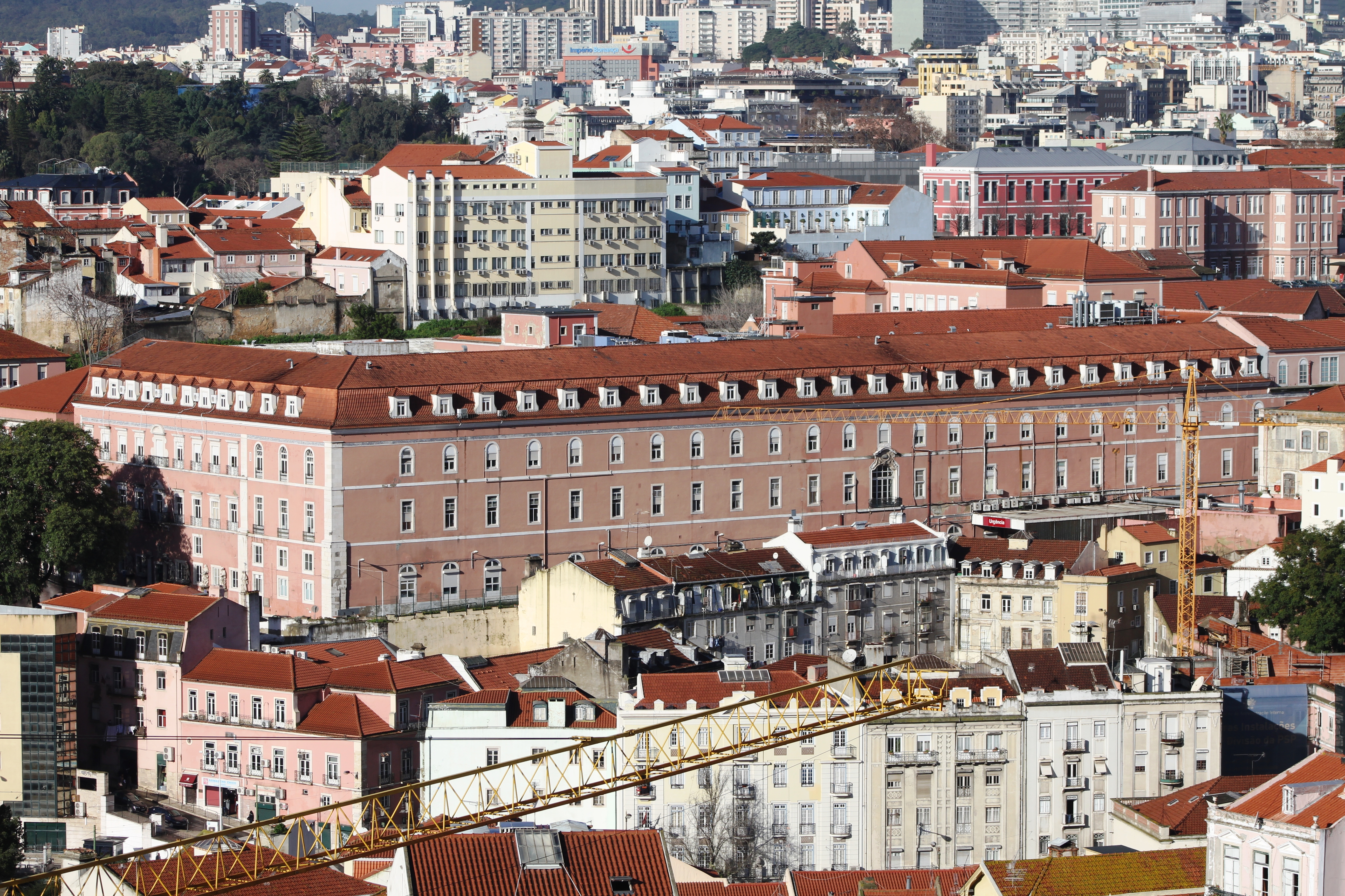 Miradouro da Graça - Hospital São José